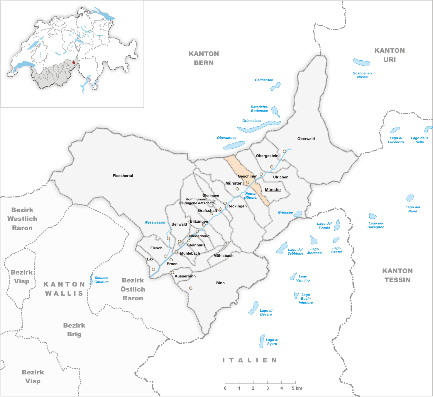 Municipality Geschinen